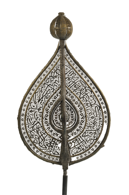 „Gott ist das Licht von Himmel und Erde. Sein Licht ist wie eine Nichte mit einer Lampe. Die Lampe ist in einem Glas, das [so blank] ist, als wäre es ein funkelnder Stern. Sie brennt von einem gesegneten Baum. Vertrau auf Gott."(Koraninschrift, Ausschnitt des Lichtverses)“